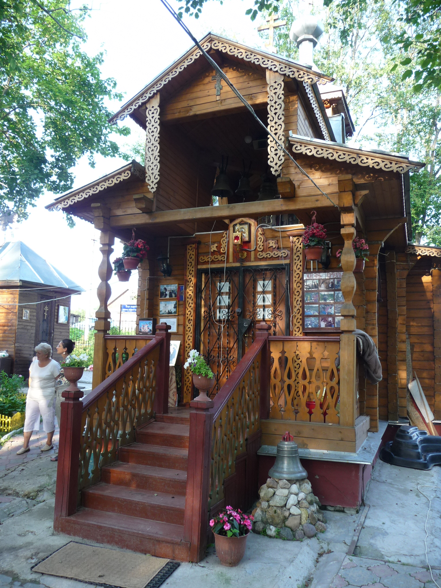 MoscowRegion-p1030240.jpg